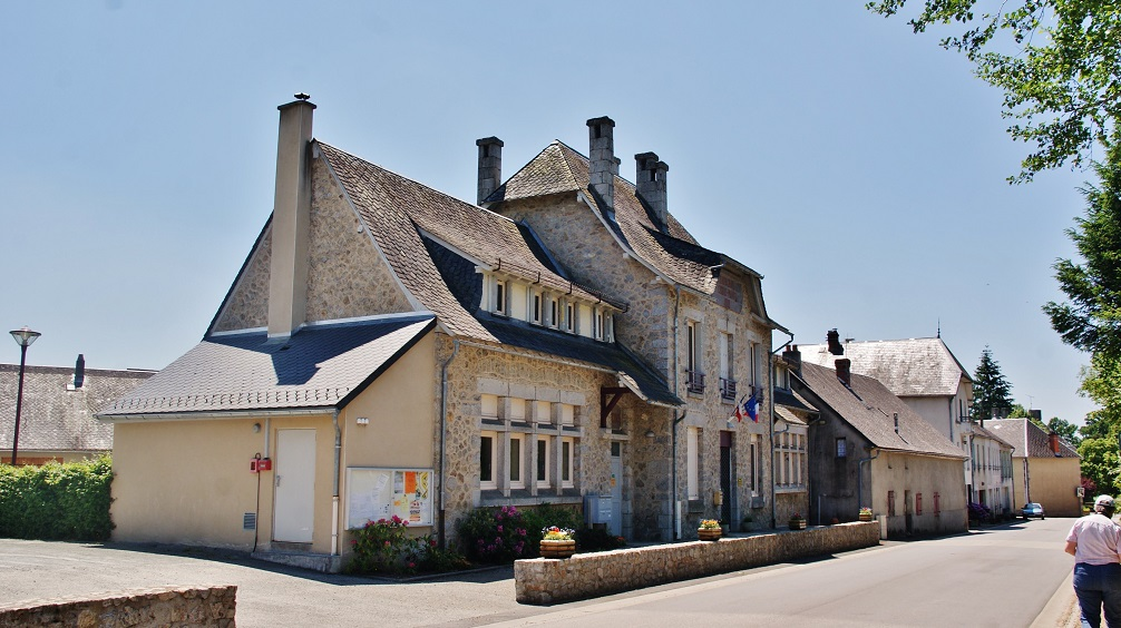 La Mairie